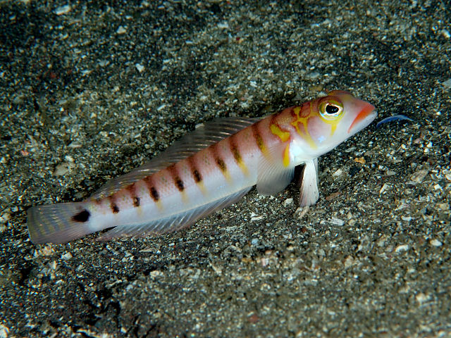 オキトラギス Parapercis multifasciata